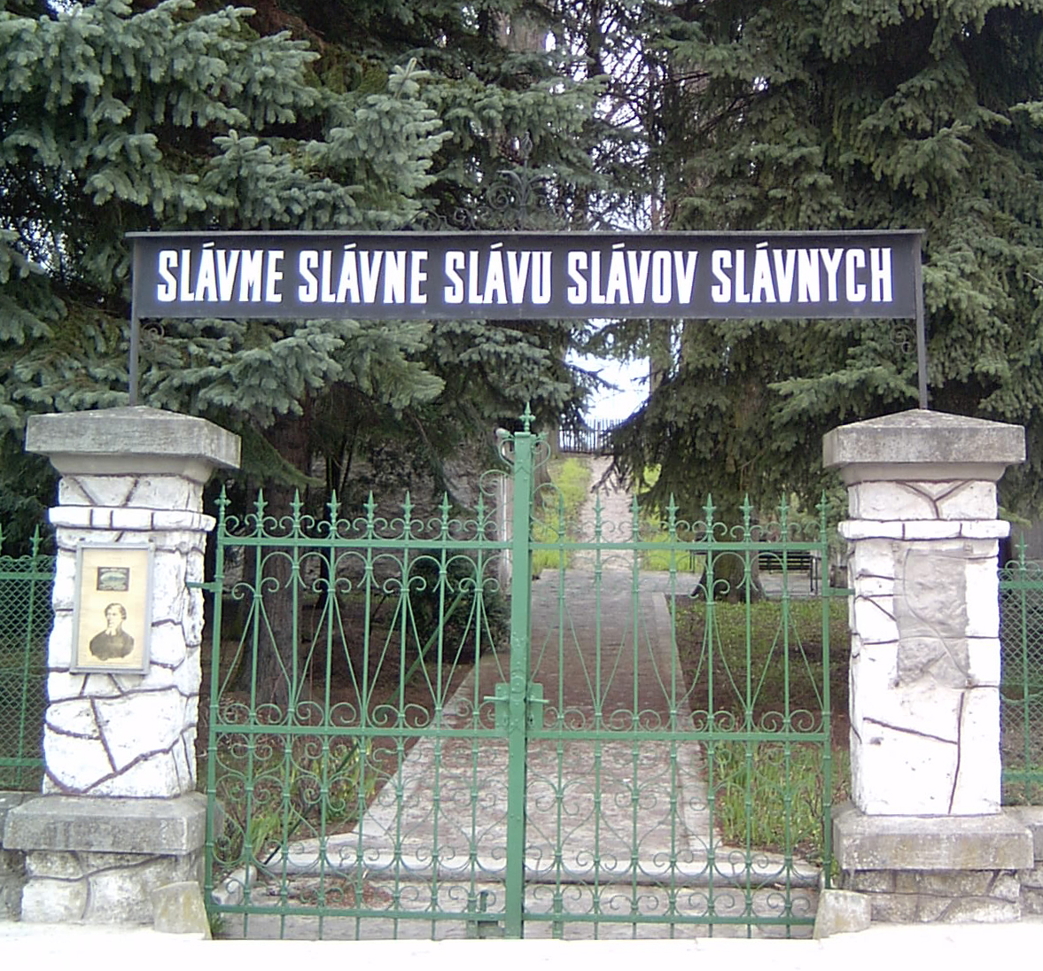 The motto of Ján Kollár, Slovak poet.